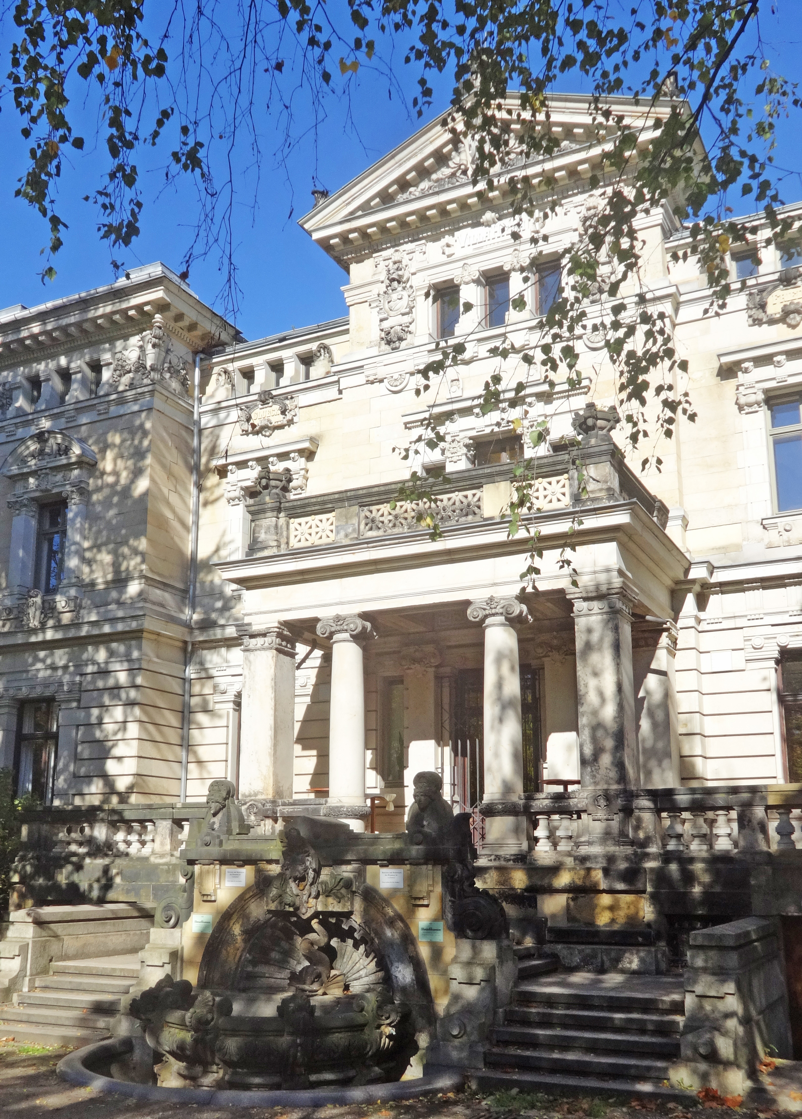 Leipzig-Gohlis, Heinrich-Budde-Haus (erbaut 1890/91 als Villa Hilda), Lützowstraße 19